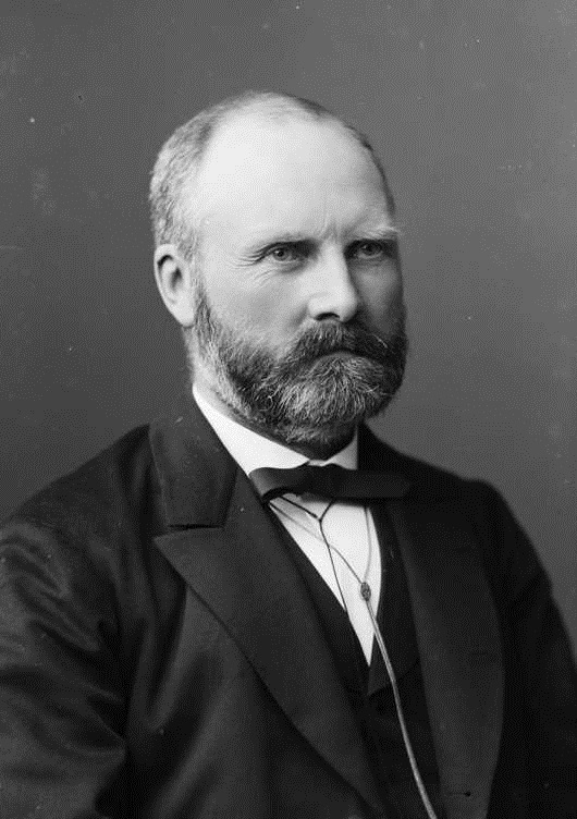 Elias Blix, portrett, mann, teolog, salmedikter, statsråd, brystbilde.